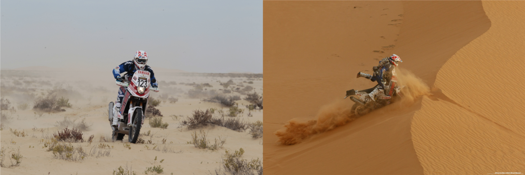 Helly Frauwallner beim Afrika Race 2013 inkl. Sturz